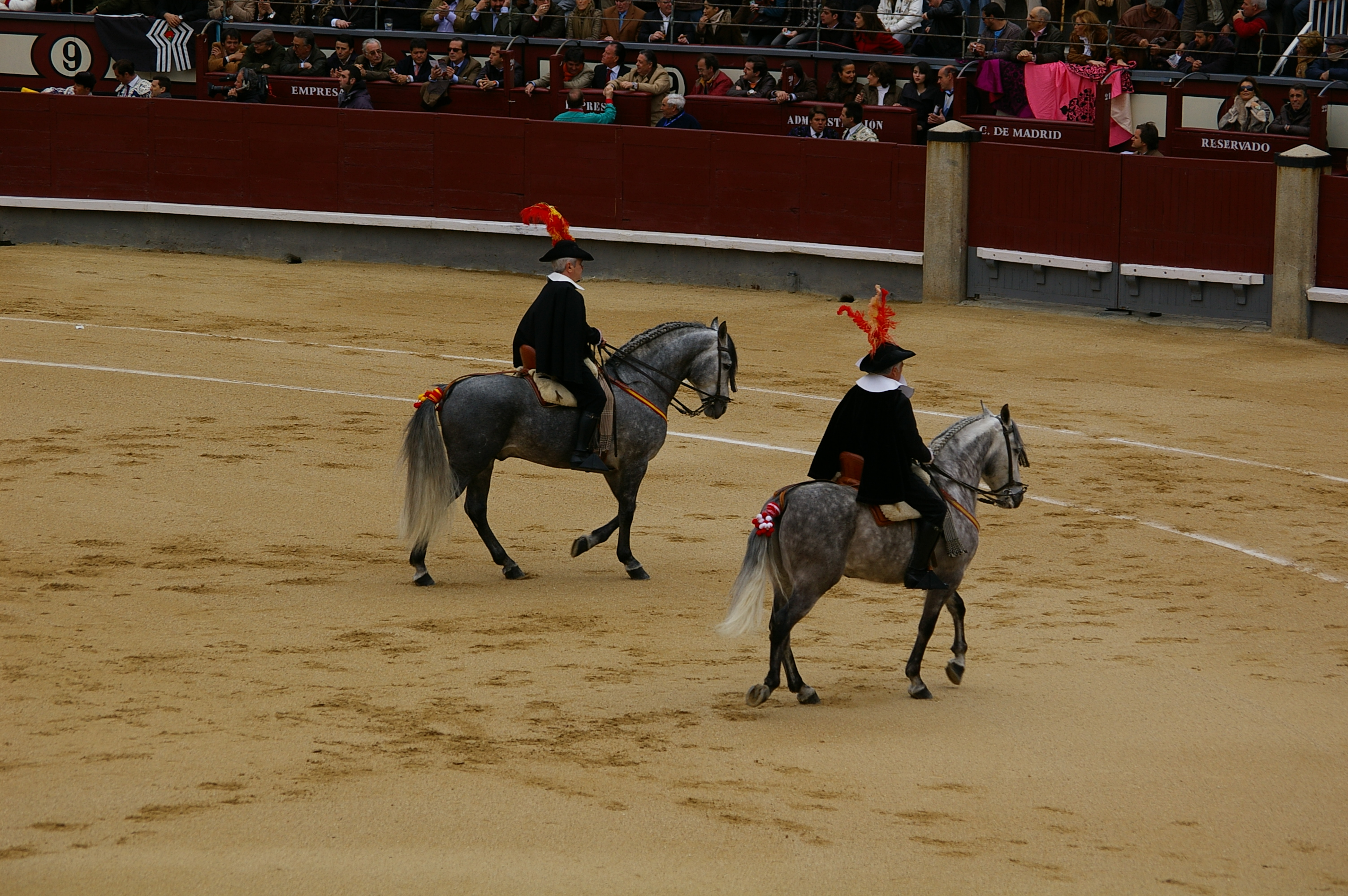 Los alguacilillos ejecutando la ceremonia del despejo en Las Ventas (Madrid, Spain, 23-03-2008)